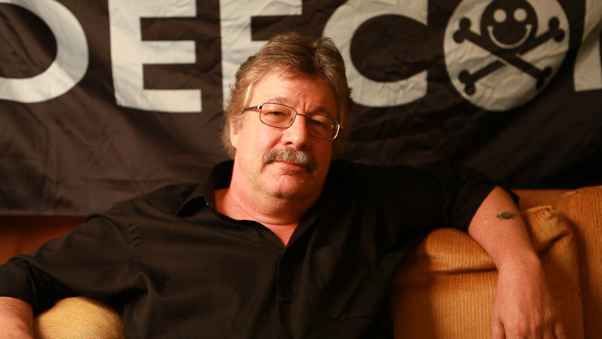 Winn Schwartau